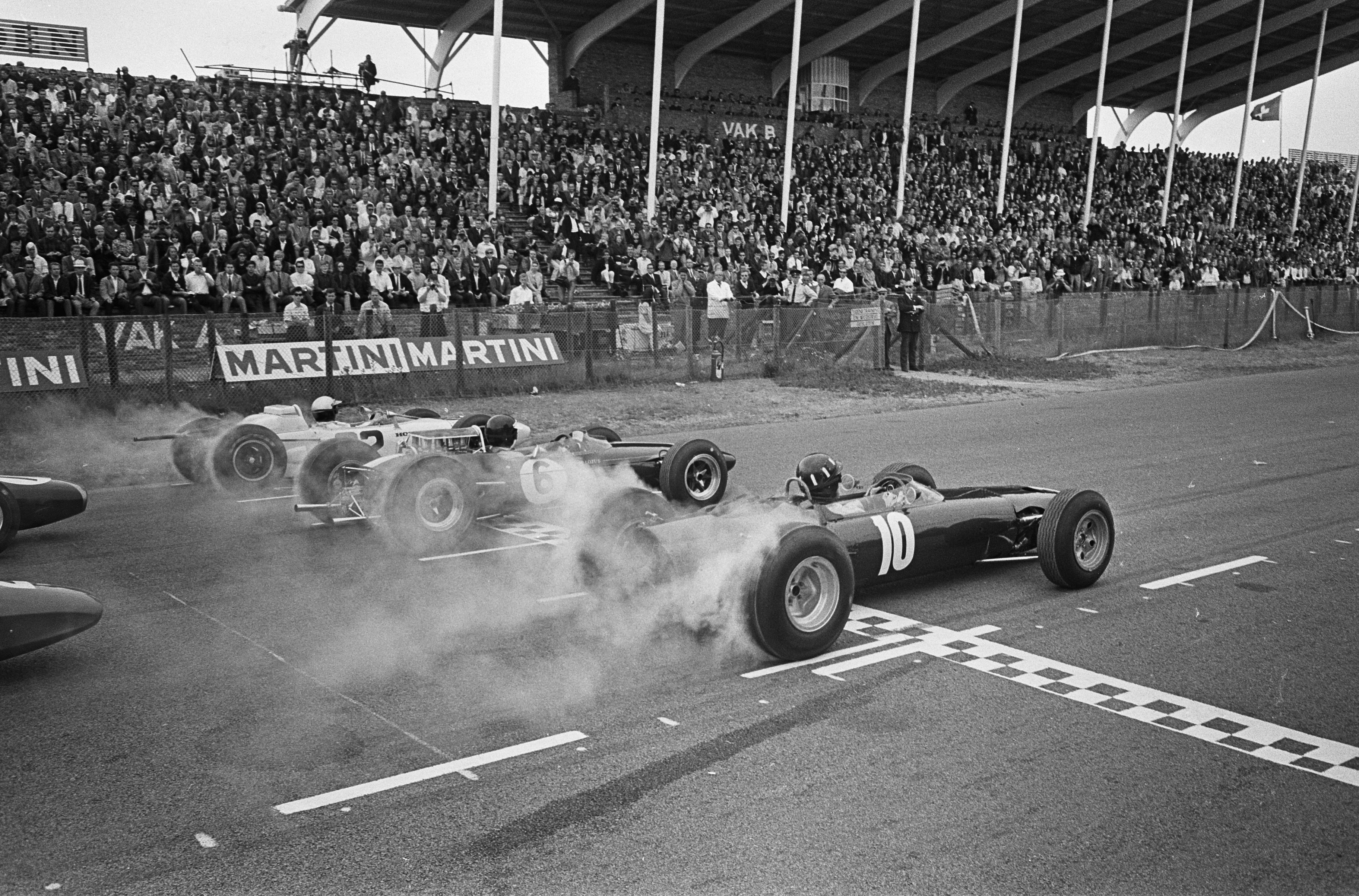 Grote Prijs van Zandvoort, de start v.r.n.l. Graham Hill, Jim Clark en "Richie' Ginther.